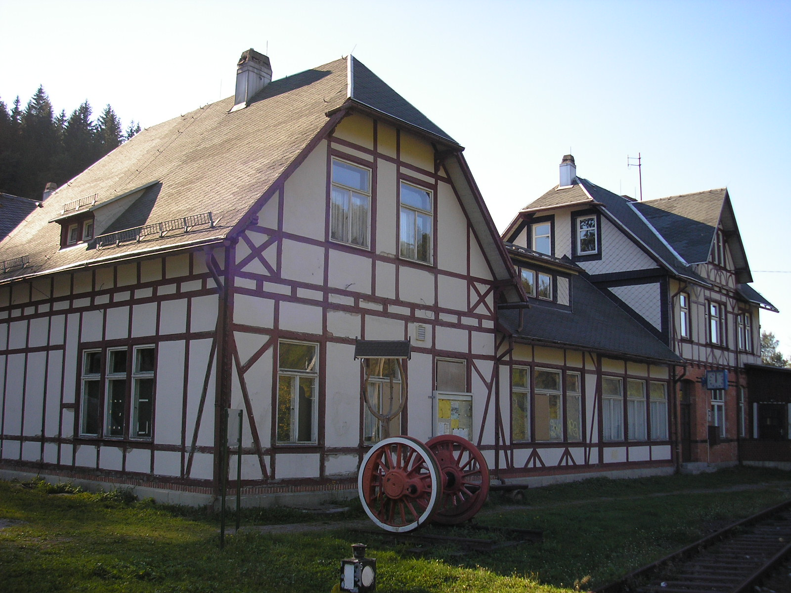 Bahnhof von Stützerbach (Thüringen).